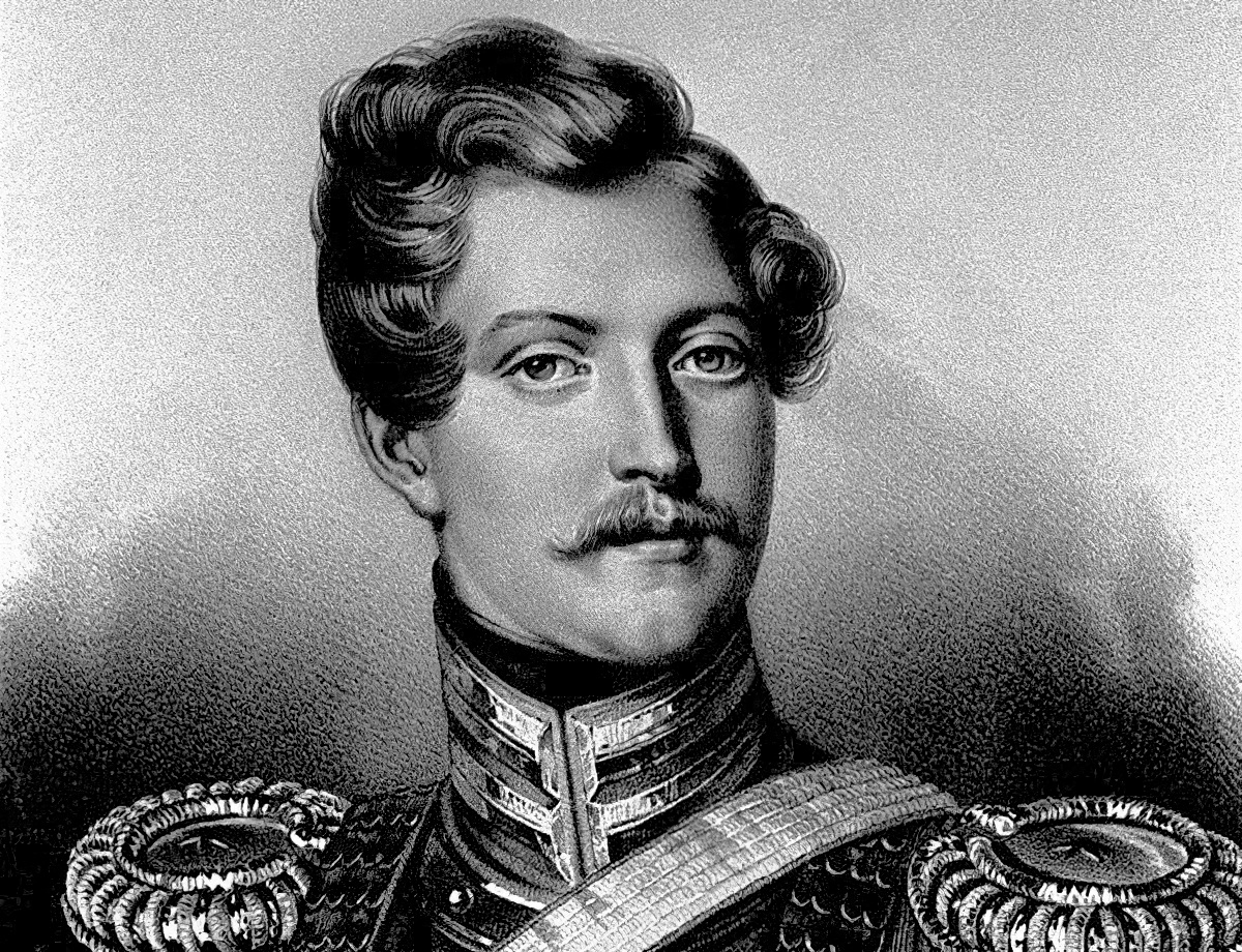 Жорж Шарль Дантес. 1830